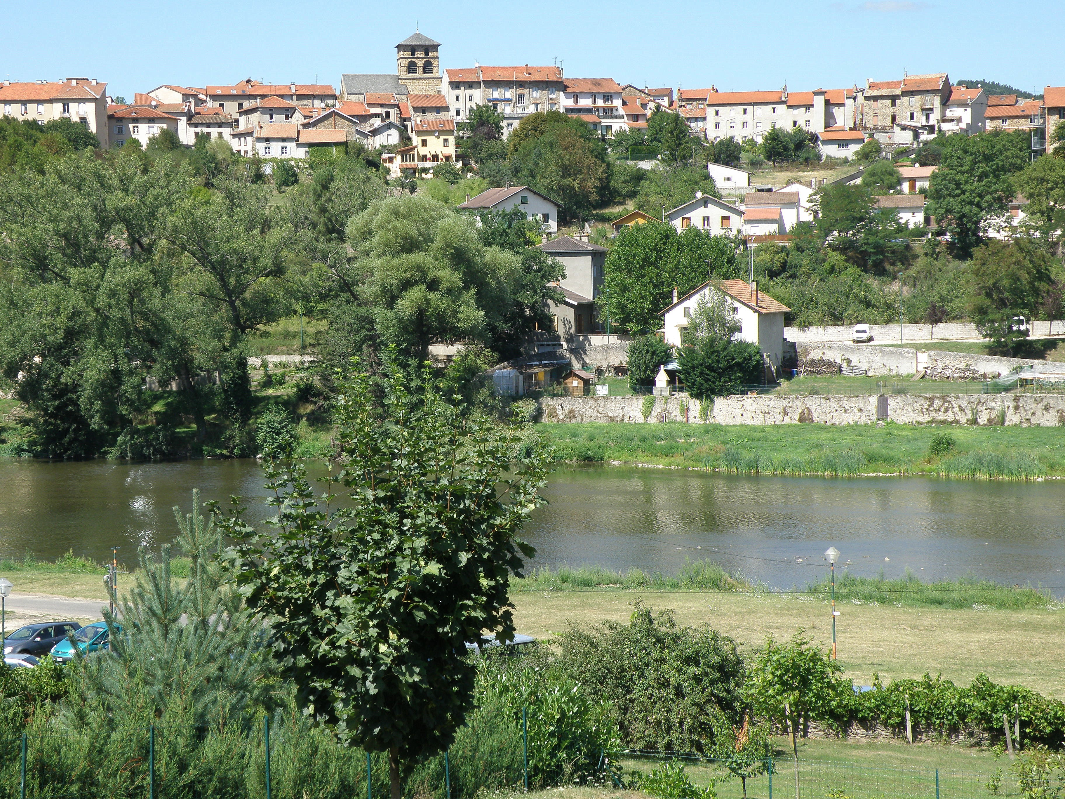 Retournac, dép. de Haute-Loire, France (Auvergne). Vue générale depuis le quartier de Retournaguet, sur la rive opposée de la Loire. En haut au centre: collégiale romane Saint-Jean-Baptiste (XIIe siècle). À l'avant-plan: la Loire.